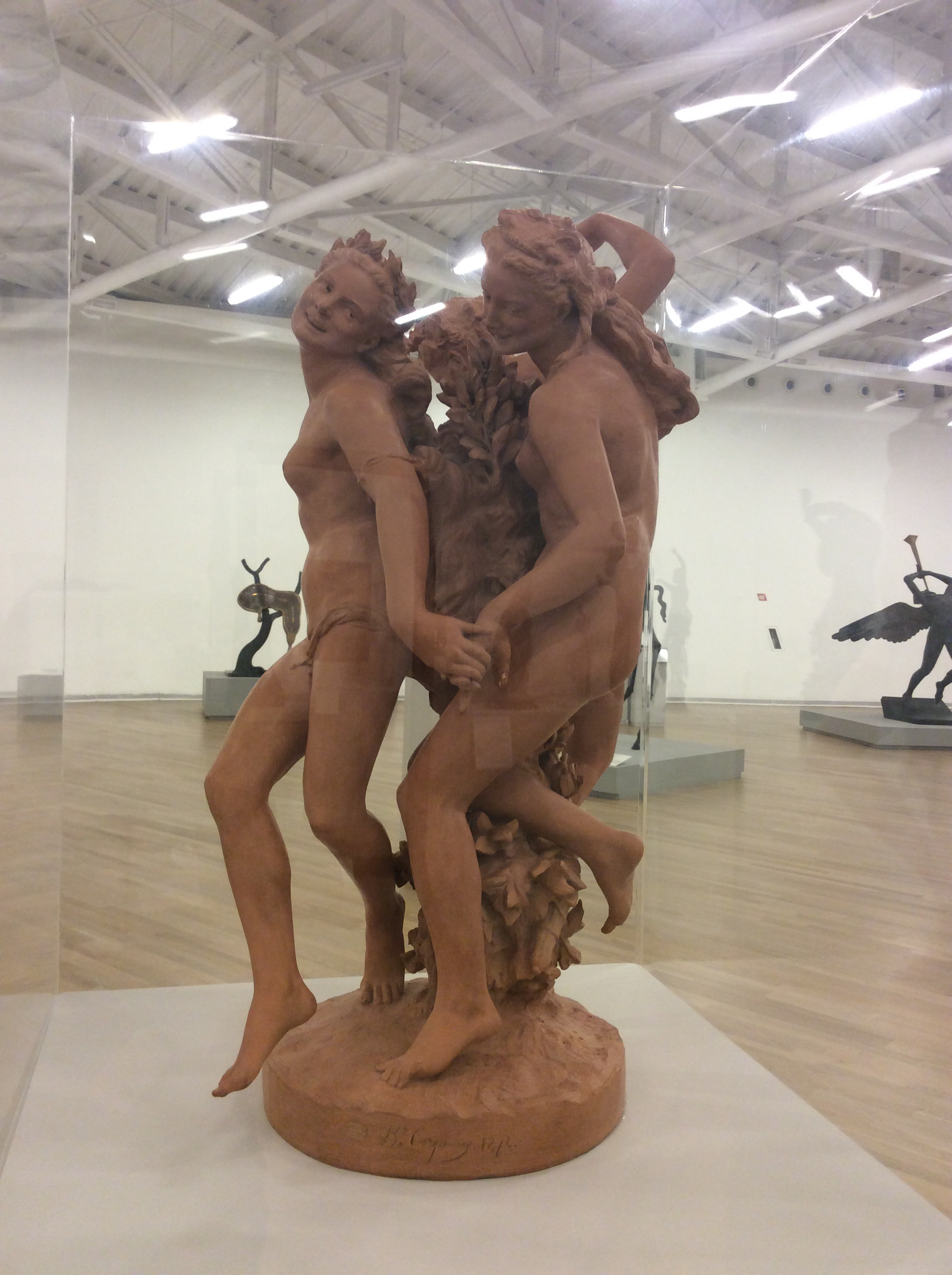 Escultura en terracota de las tres gracias de Jean-Baptiste Carpeaux. De 1872? Forma parte de la fachada de la ópera de París